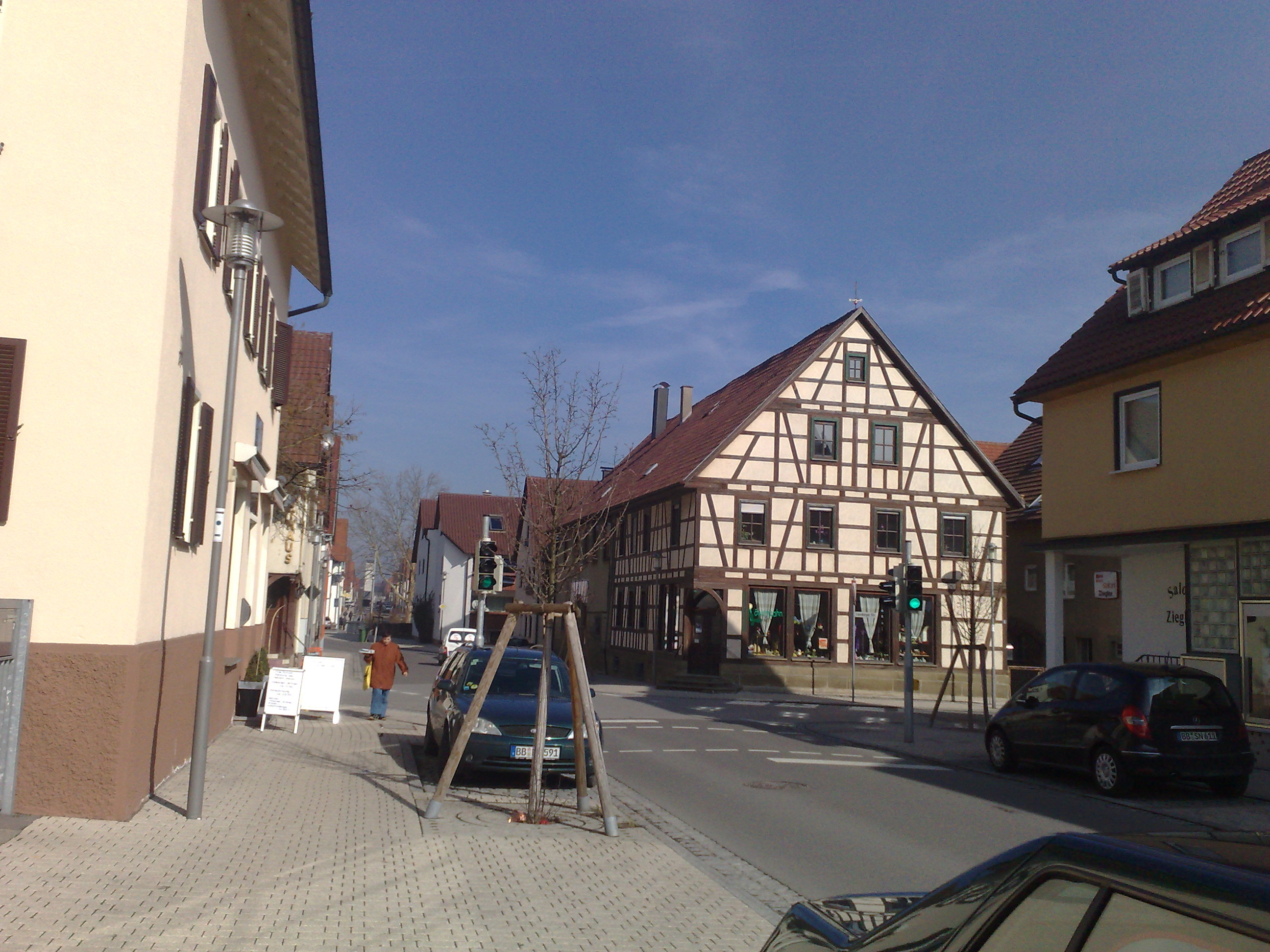 Renningen